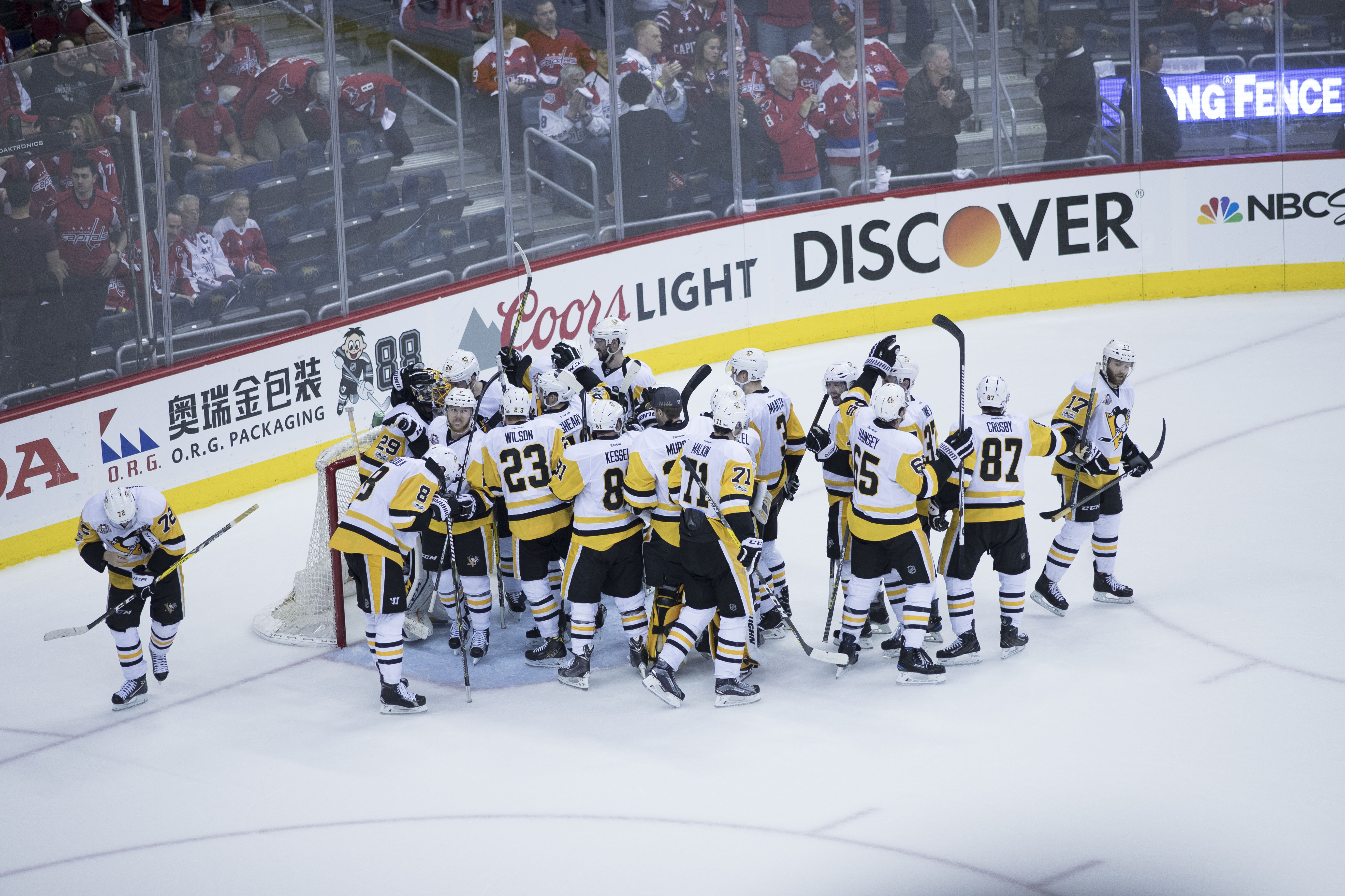 Penguins at Capitals 5/10/17